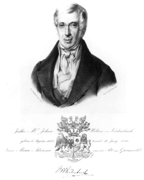 Jan Willem van Vredenburch, burgemeester van Rijswijk